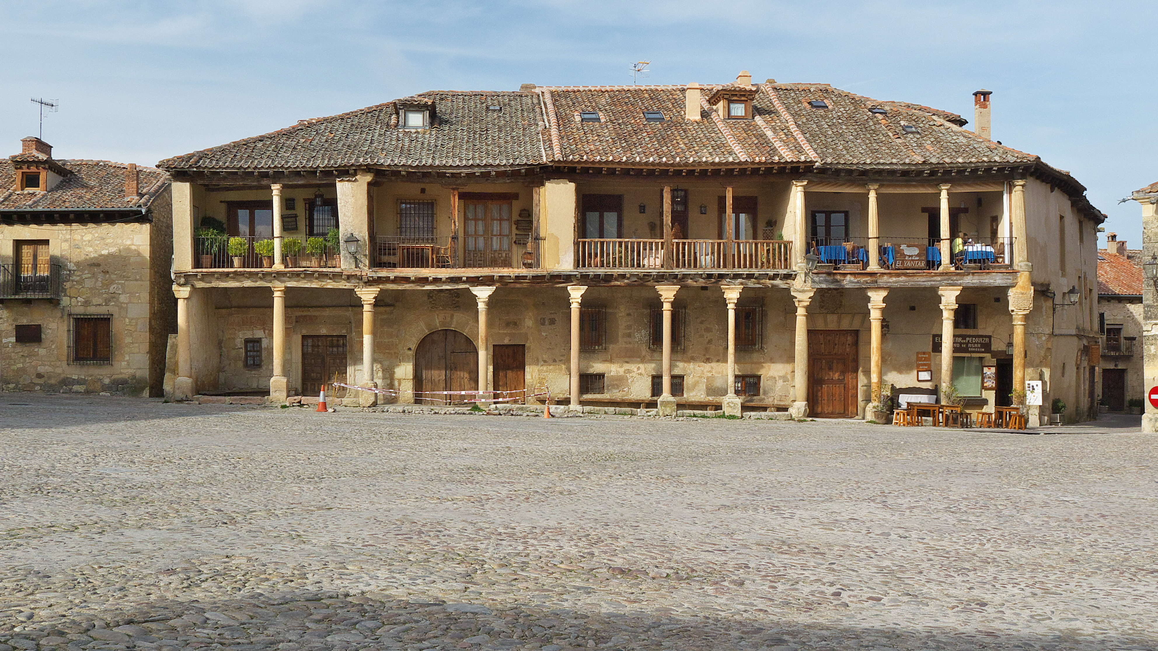 Edificios de la Plaza Mayor